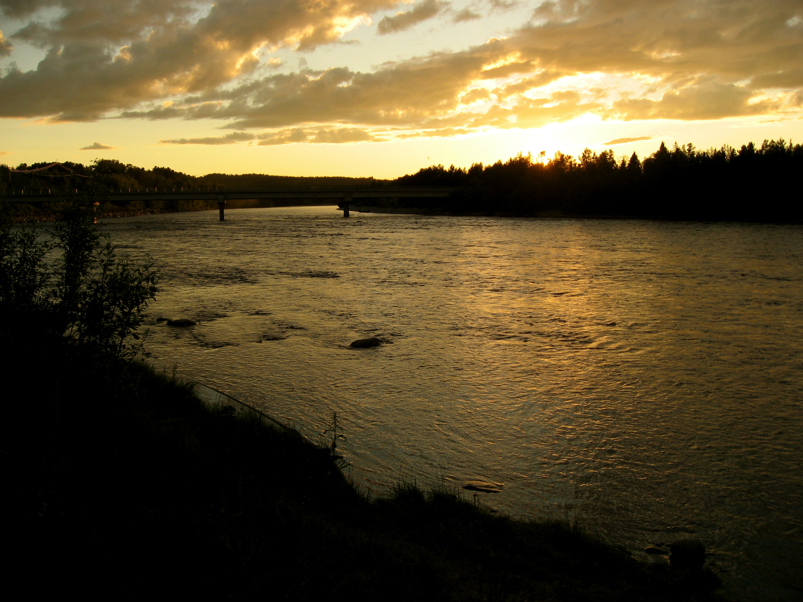 Alta river